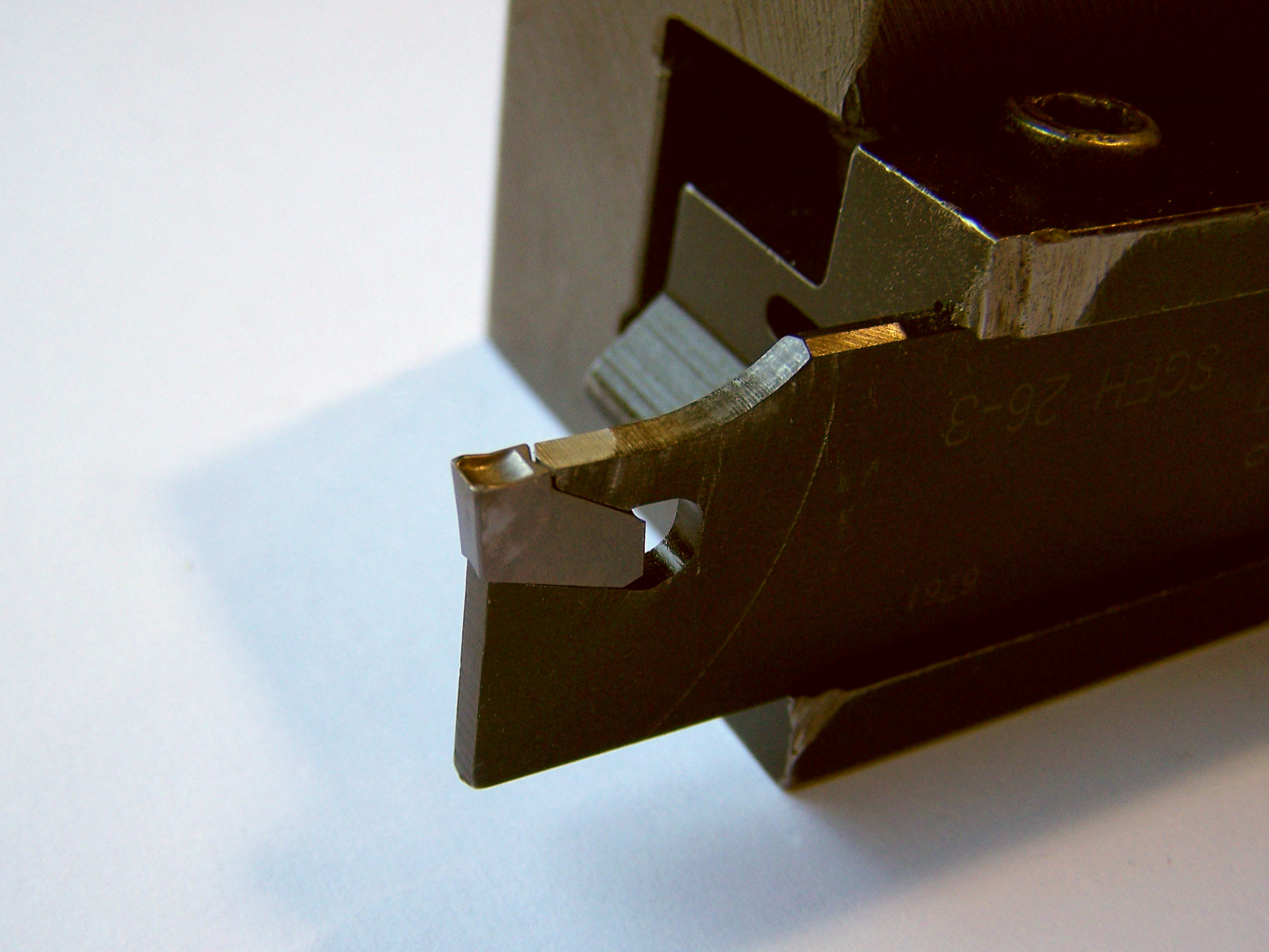 Vollhartmetall Abstechstahl (Drehen) im Halter